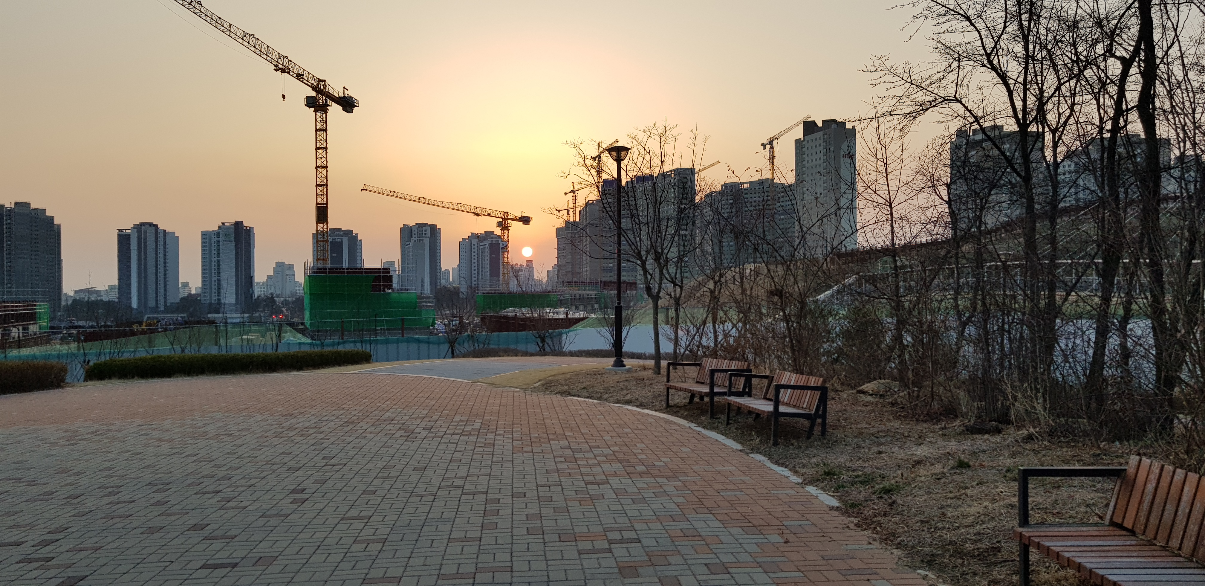 평택시 저녁모습